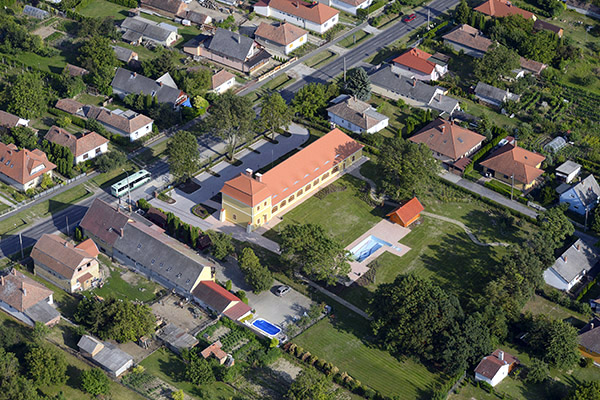 Balatonkeresztúr, Festetics-kastély